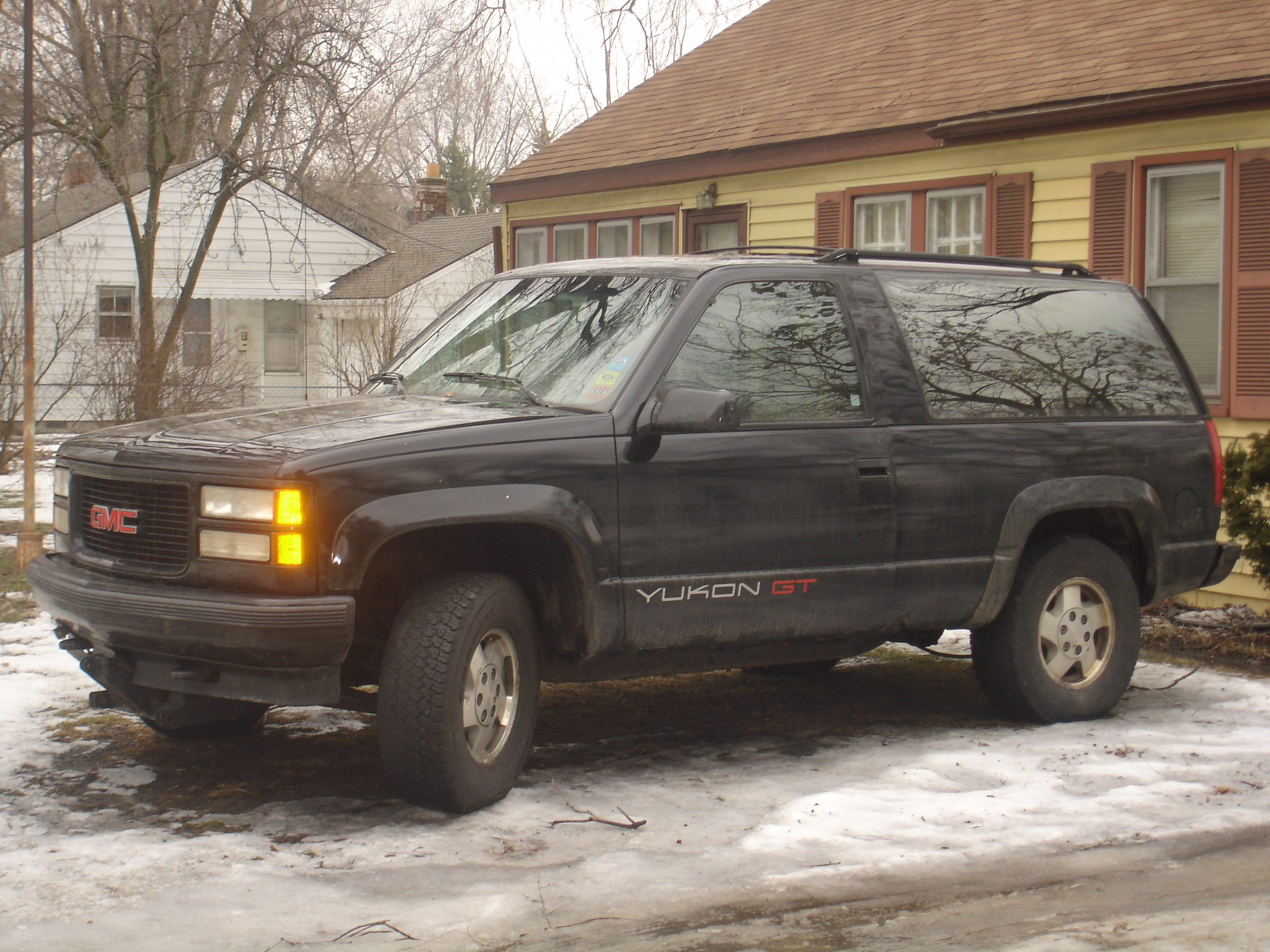 1993 GMC Yukon GT